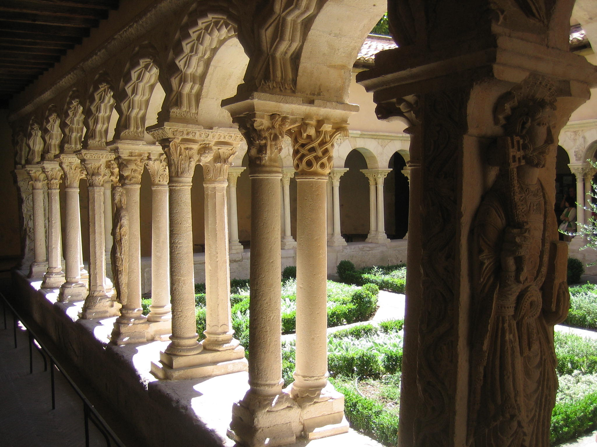 Kreuzgang von St.Sauveur in Aix-en-Provence/Frankreich